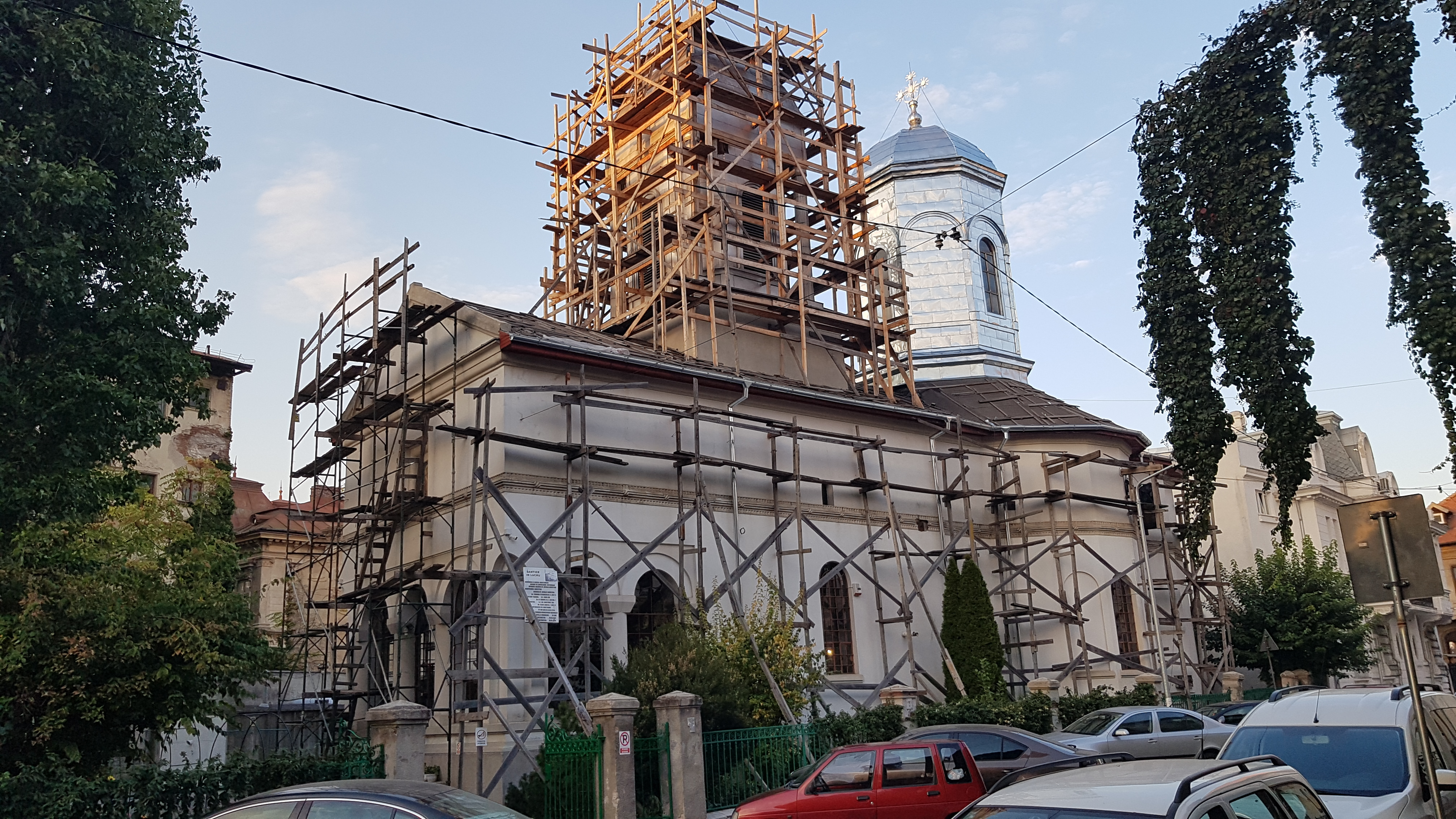 Biserica „Sf. Nicolae” - Negustori